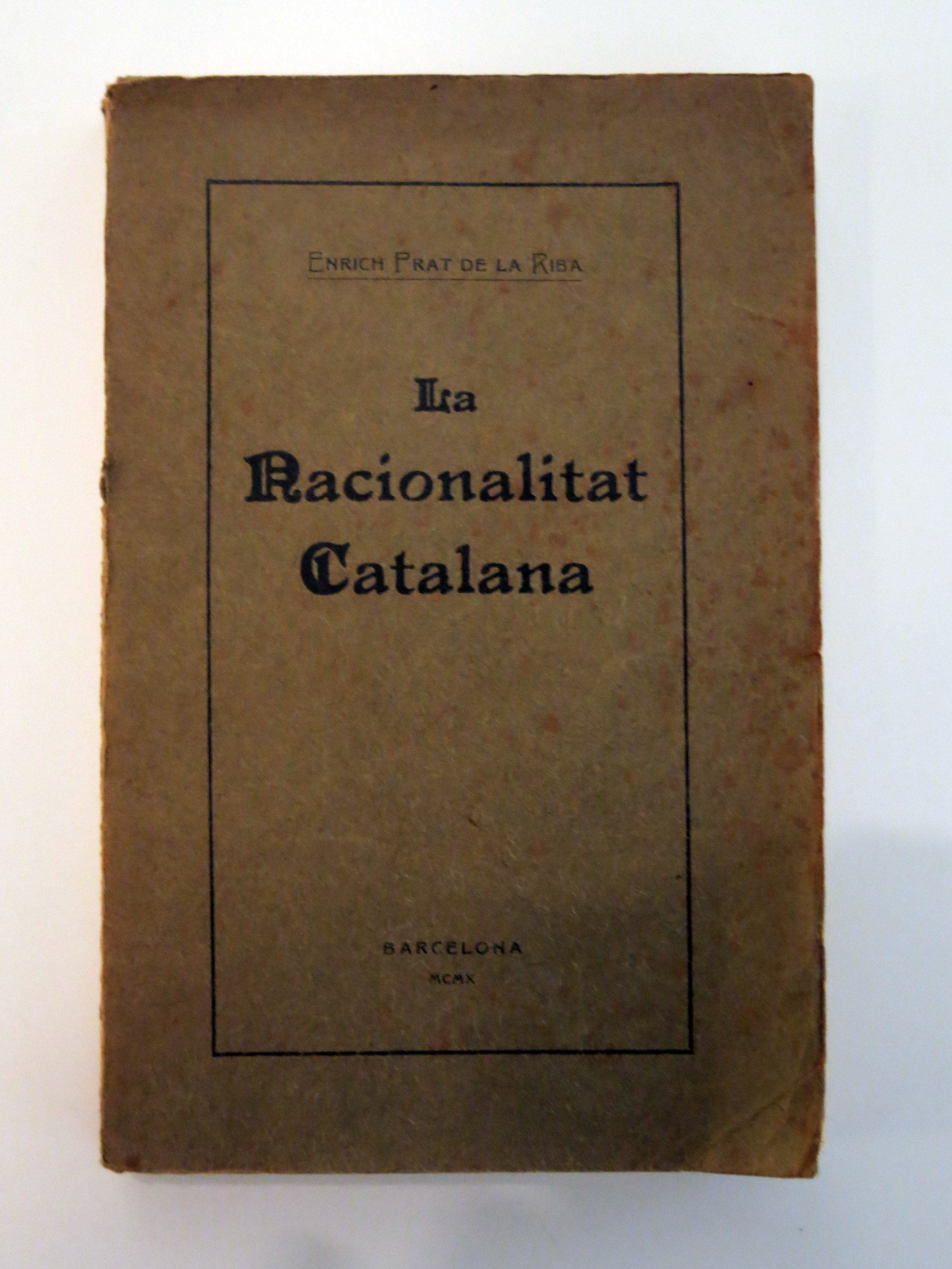 La nacionalitat catalana (Prat de la Riba), edició original. Exposició "Enric Prat de la Riba i la Mancomunitat de Catalunya"